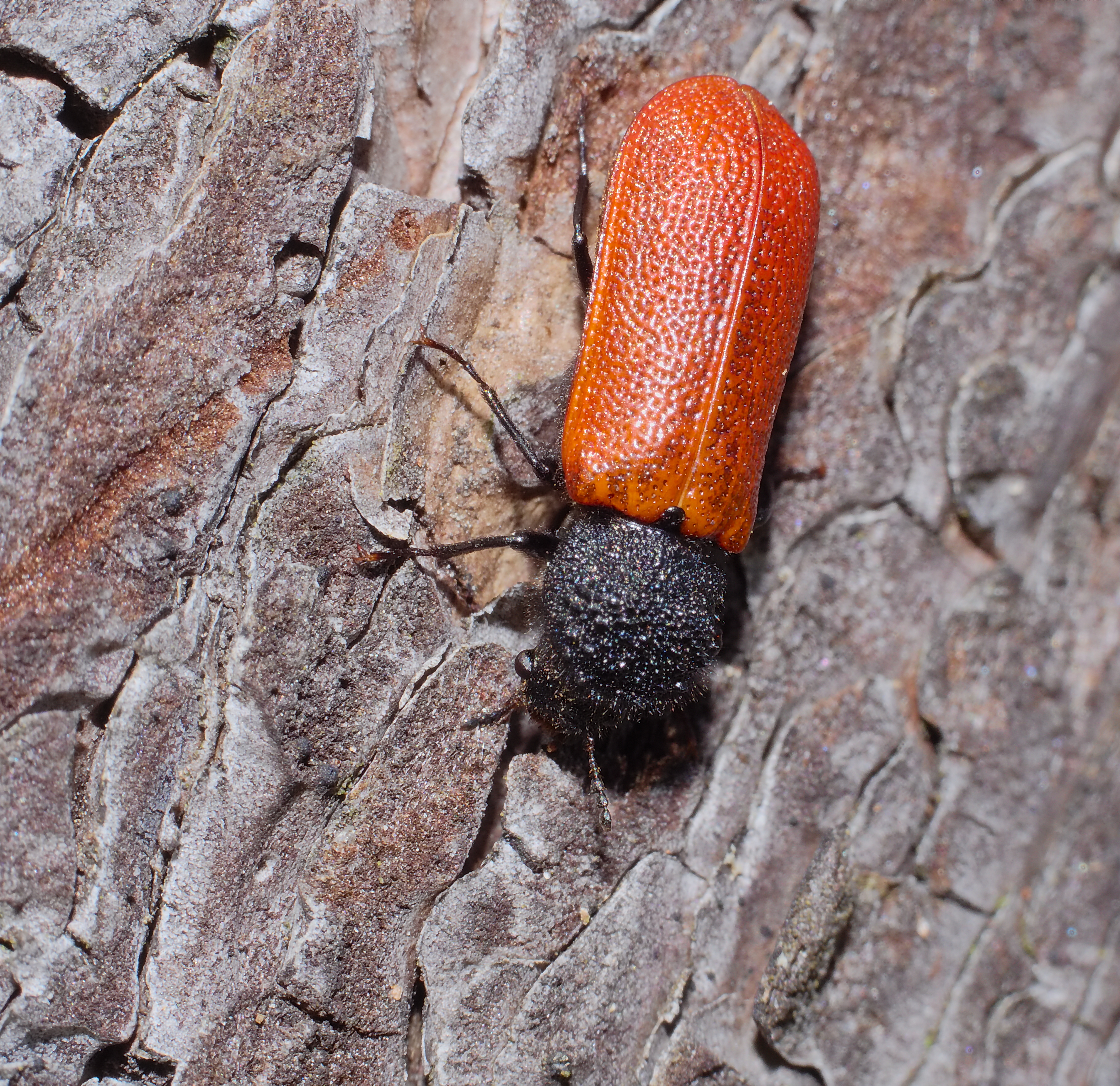 Karminroter Kapuzinerkäfer - Bostrichus capucinus. Aufgenommen in der Viernheimer Heide, Viernheim, Hessen, Deutschland.